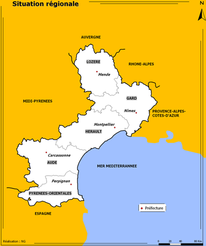 Situation régionale de la Lozère